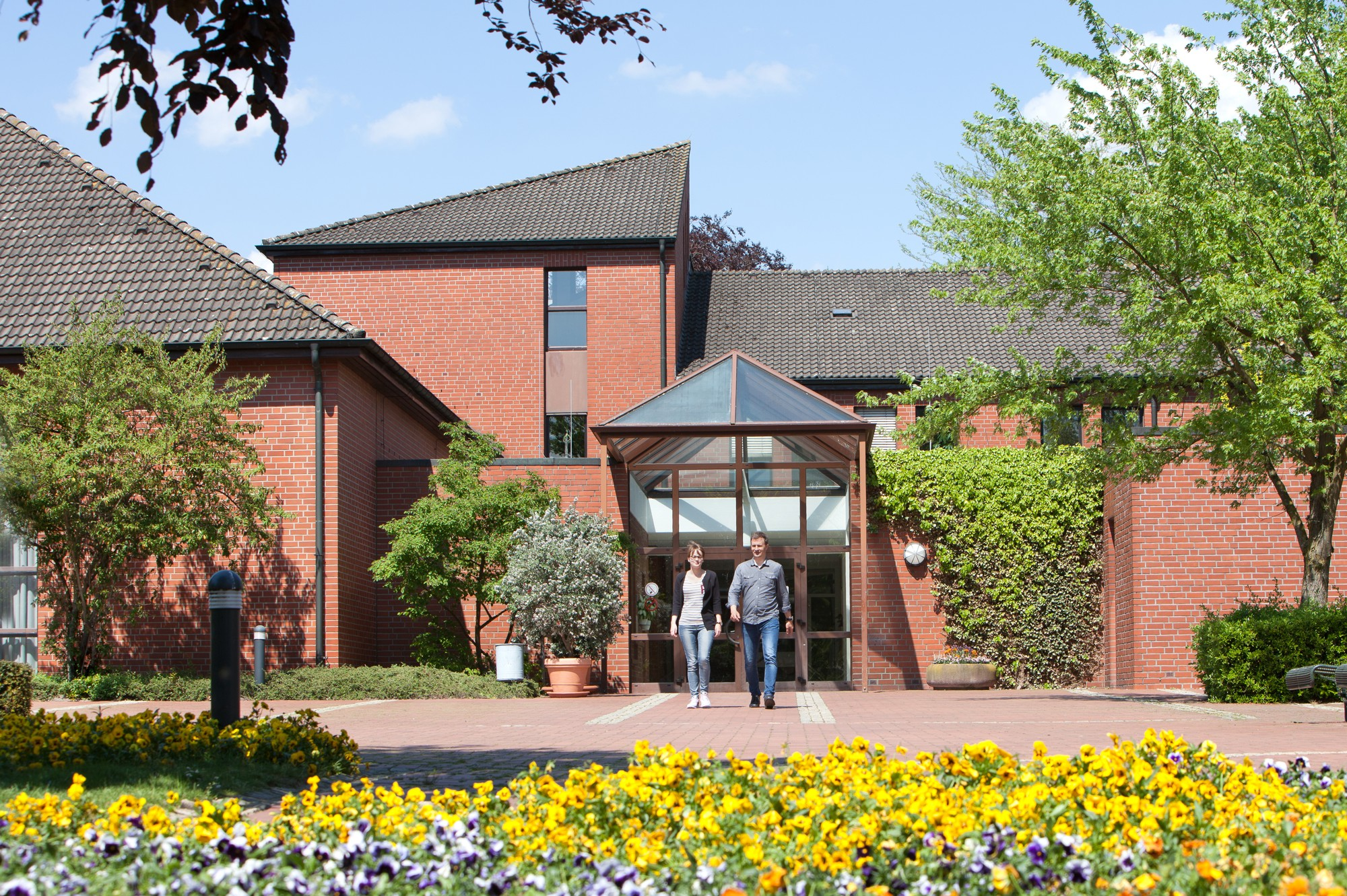 St. Rochus-Hospital Telgte, Haupteingang (2016)